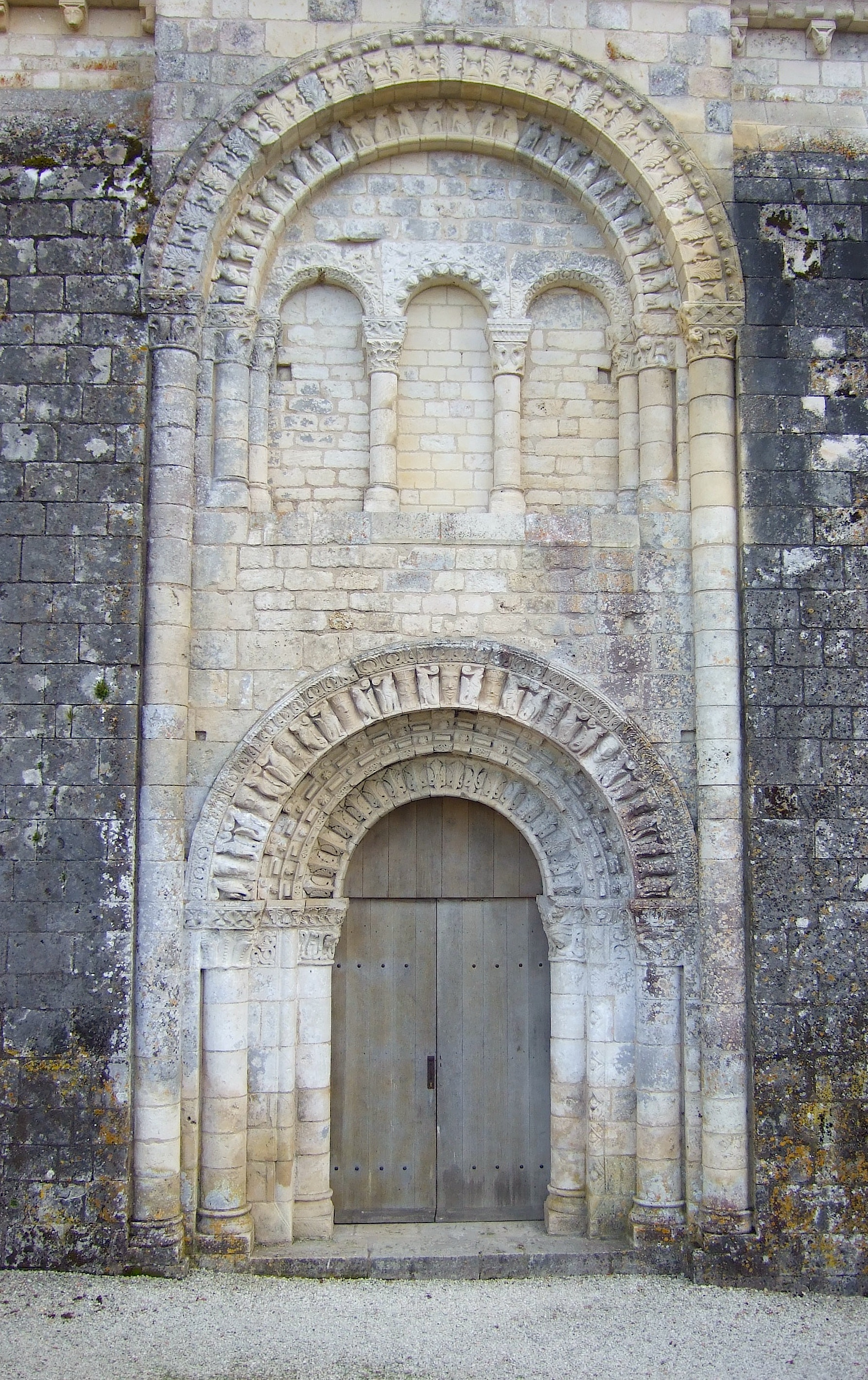 Portail nord de l'église XIIe siècle du prieuré de Villesalem (Vienne)